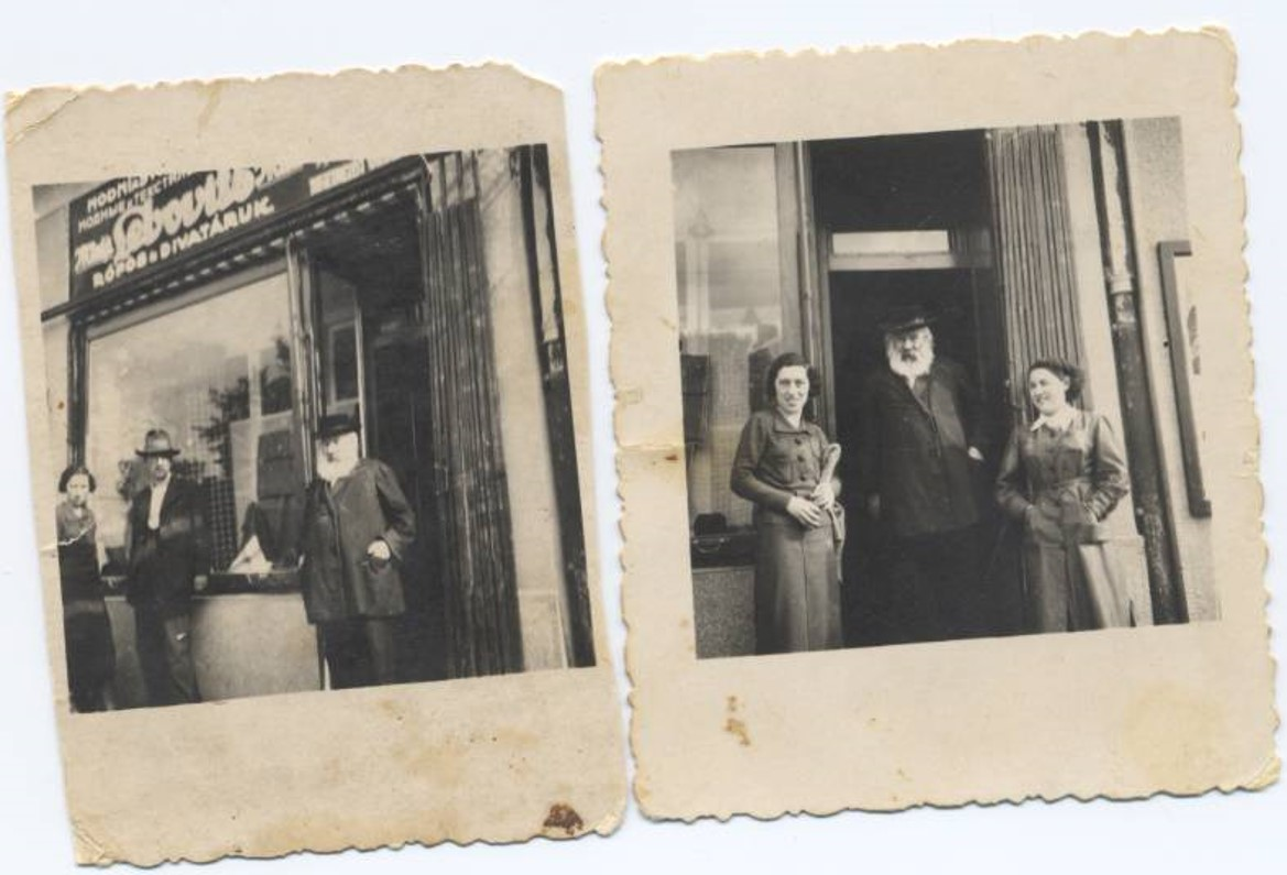 יהודי בעל חנות טקסטיל